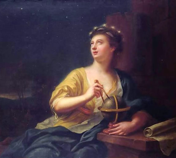 ? × ? cm